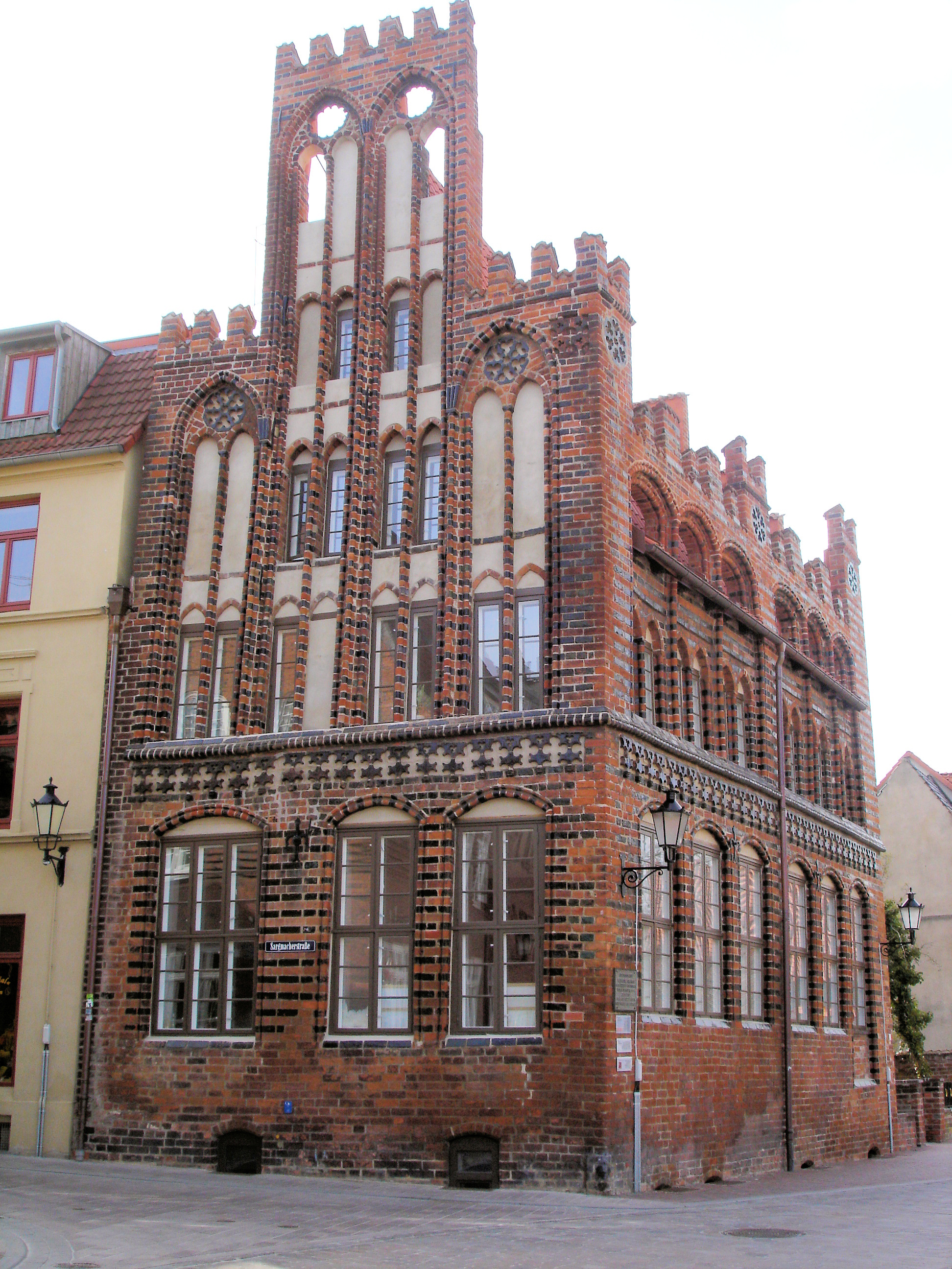 Ehemaliges Archidiakonat Wismar, Mecklenburg-Vorpommern